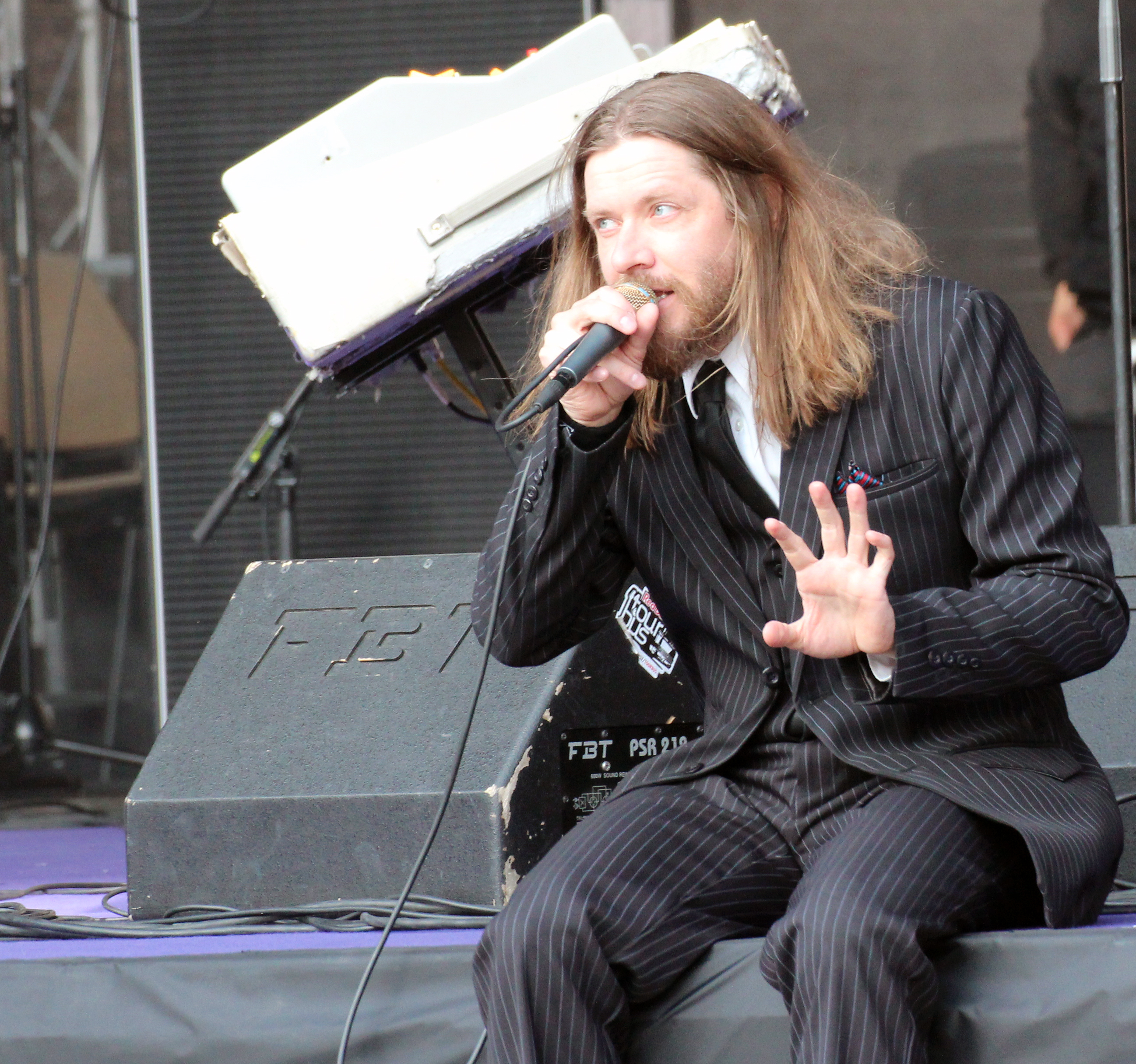 Meelis Hainsoo esinemas Tallinna Raekoja platsil ansambli Kosmikud koosseisus.